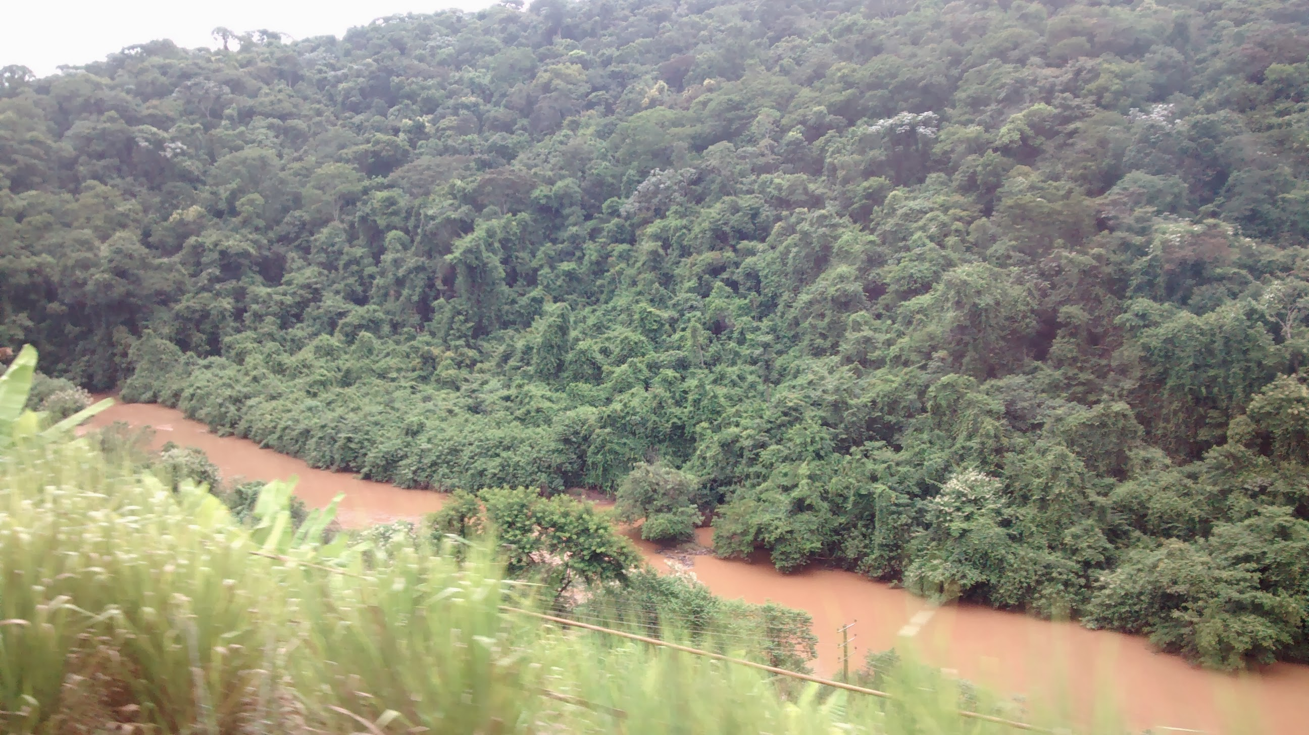 Centro Industrial, João Monlevade - MG, Brazil